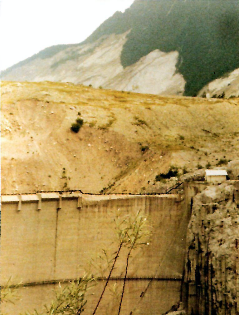 Vaiont-Staumauer nach Bergsturz nahezu unbeschädgt; dahinter Teil des Bergsturzes